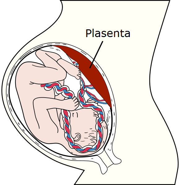 Malay translation, and derivative for the original file File:Placenta.svg.